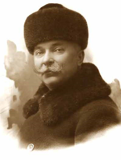 Павел Федотович Алешин